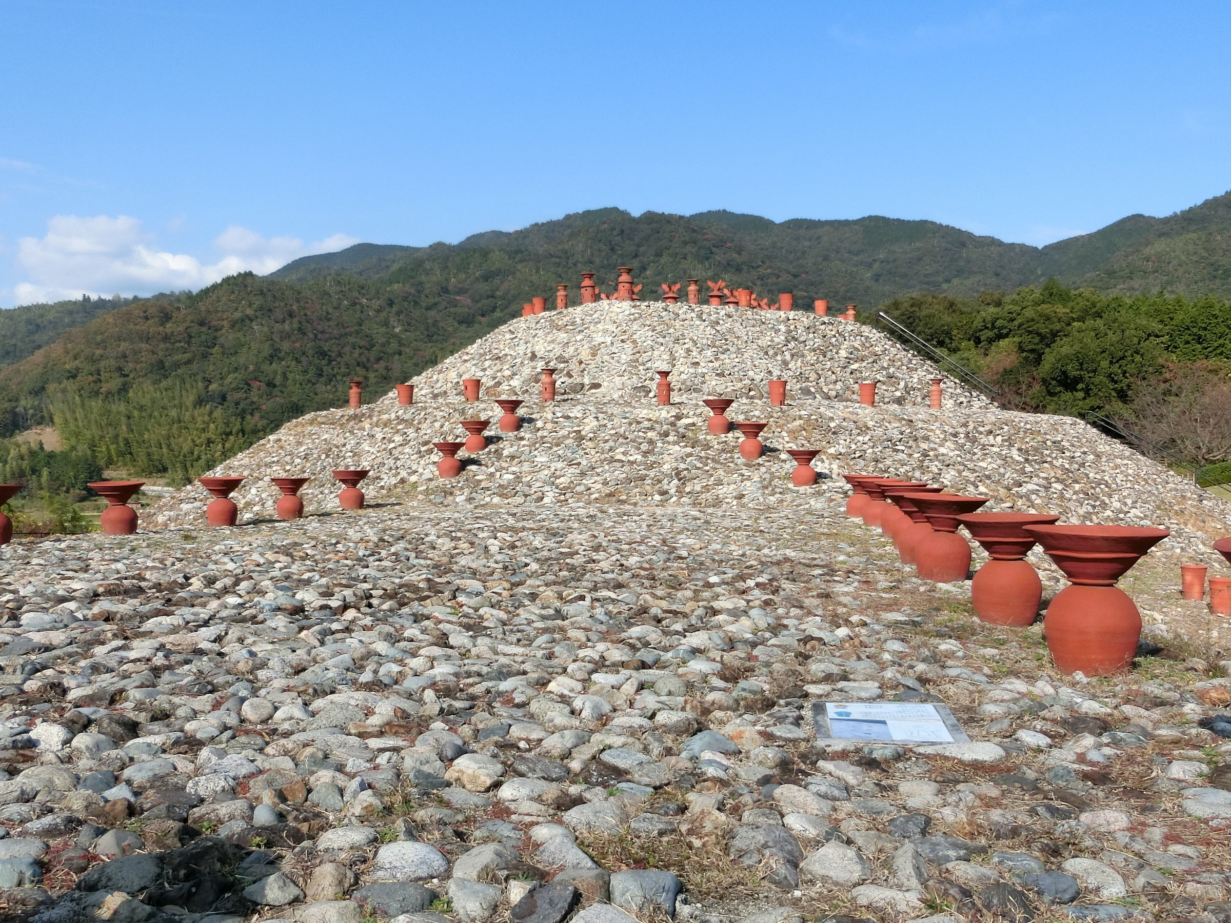 柳井茶臼山古墳（柳井市）。前方部から後円部を撮影。